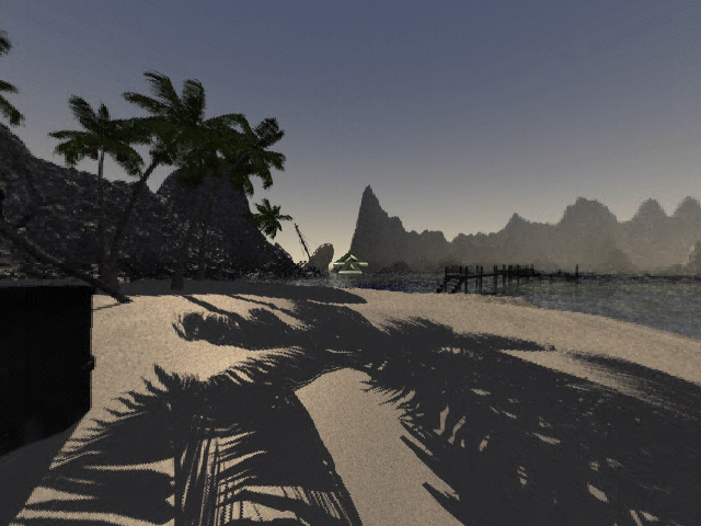 Capture d'écran du jeu vidéo L'Amerzone (1999), développé et édité par Microïds.